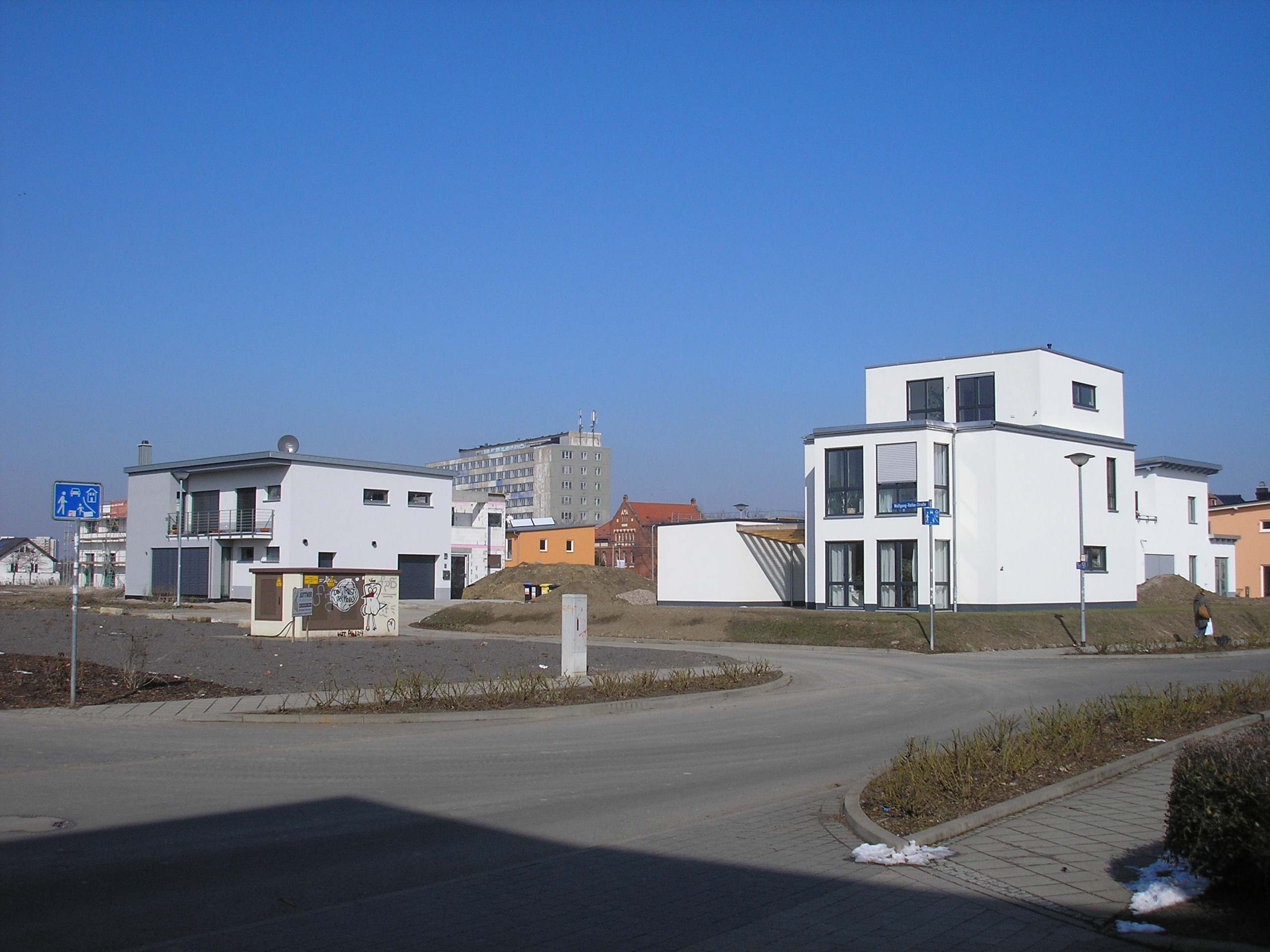 Neue Einfamilienhäuser in der Wolfgang-Ratke-Straße (am Universitätsgarten) in Erfurt.